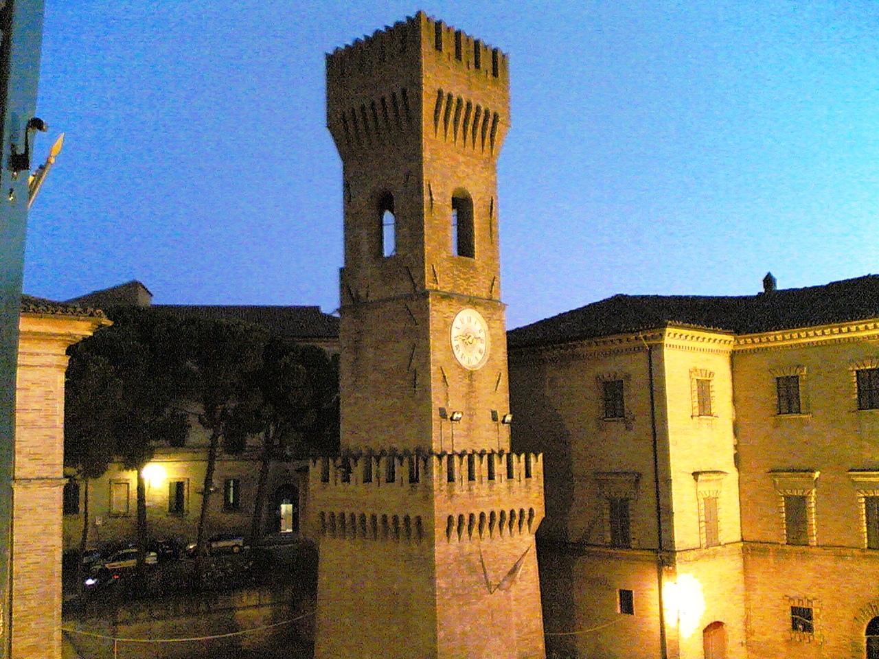 La Torre Civica di Ostra in notturna